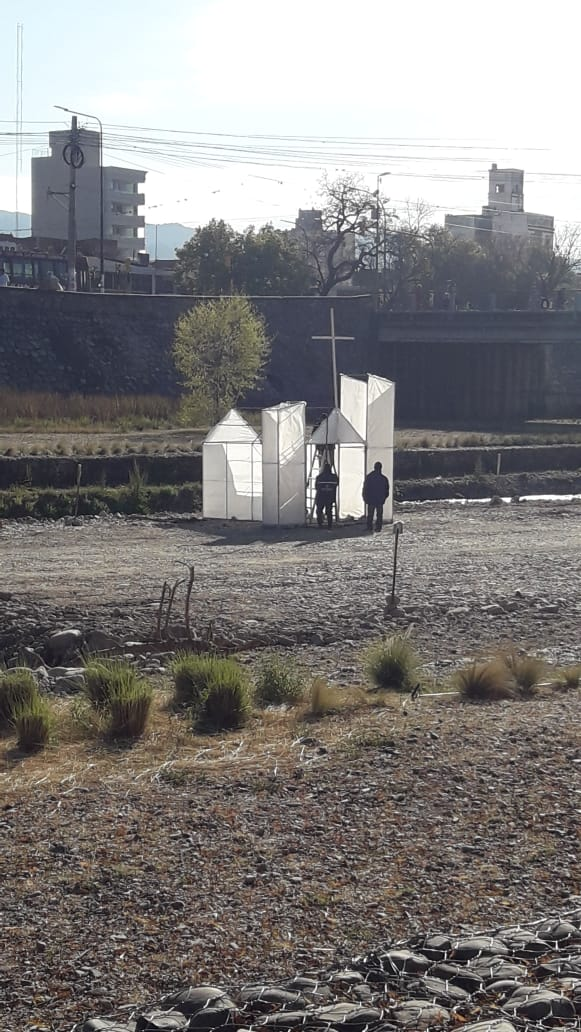 en lecho del rio xibi xibi se realiza el armado de la casas de paja para luego hacer la quema simbolica del 23 de agosto